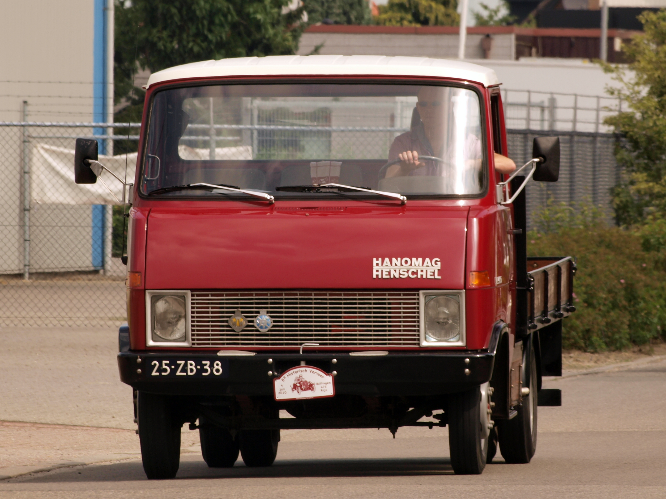 Hanomag-Henschel F45-35 (1972)